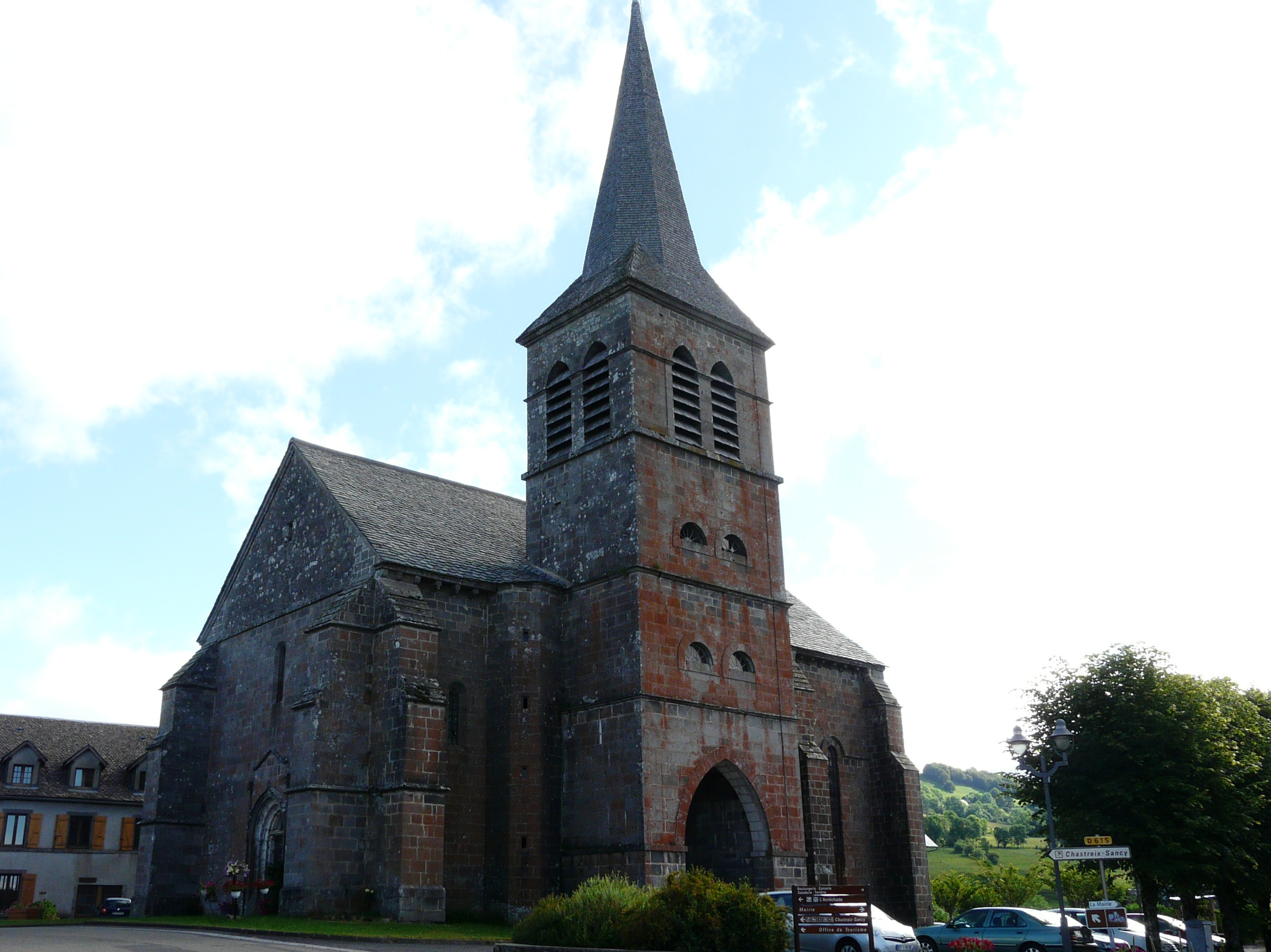 L'église Saint-Bonnet de Chastreix, Puy-de-Dôme, France.